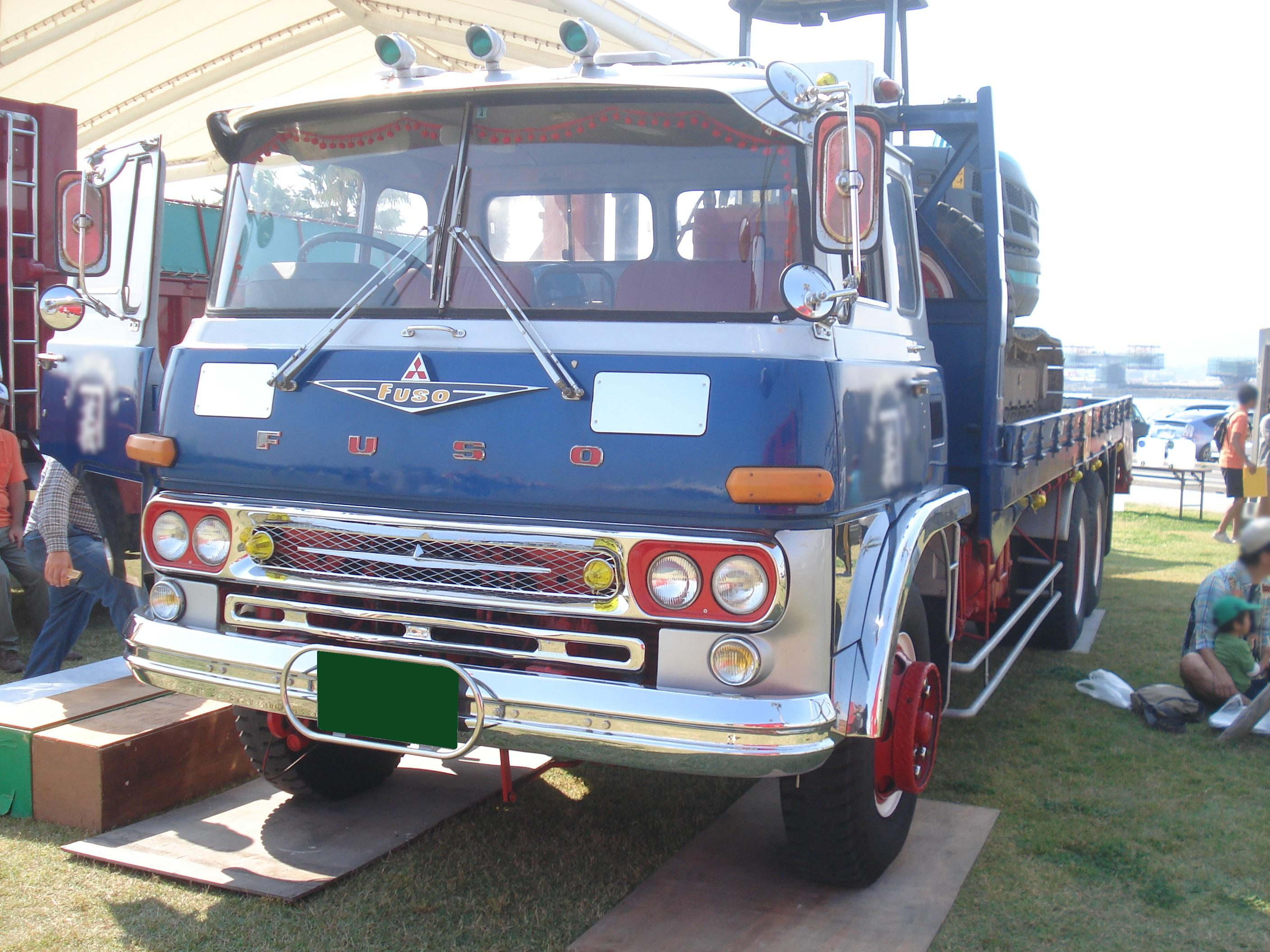 三菱ふそうTシリーズ 搬送車